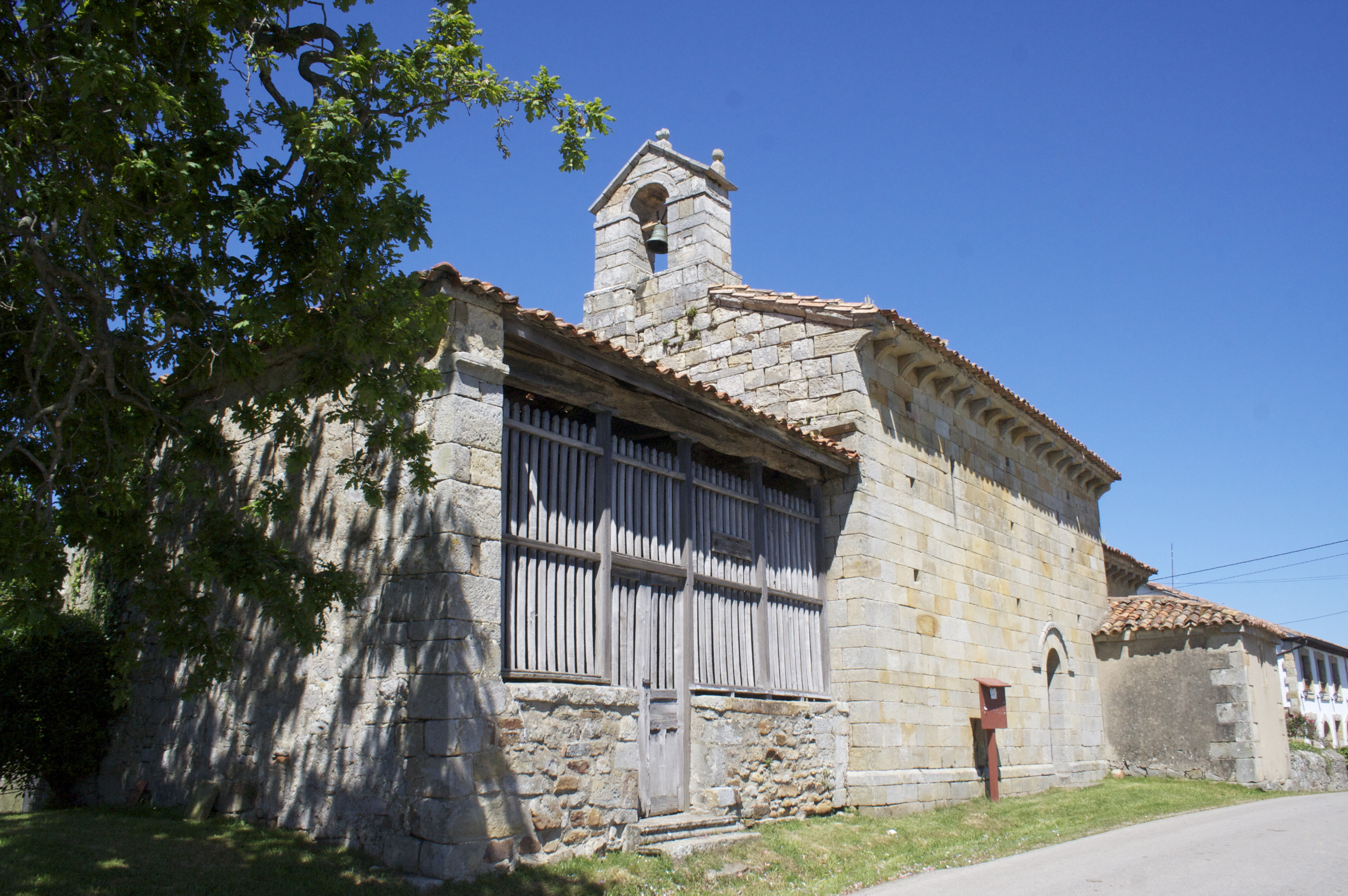 Iglesia de Santa María, La Lloraza, concejo de Villaviciosa